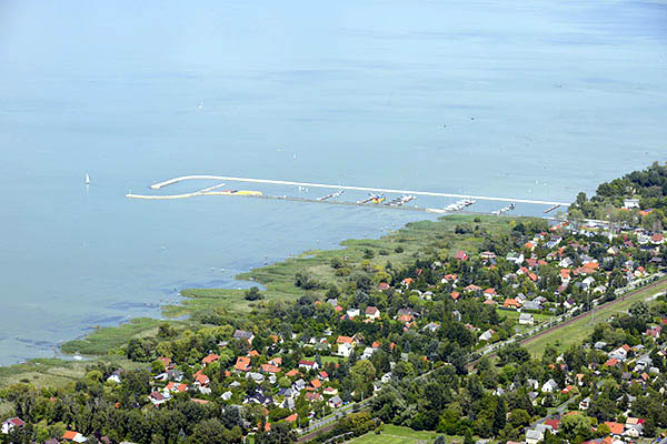 Balatonfenyves légi fotó